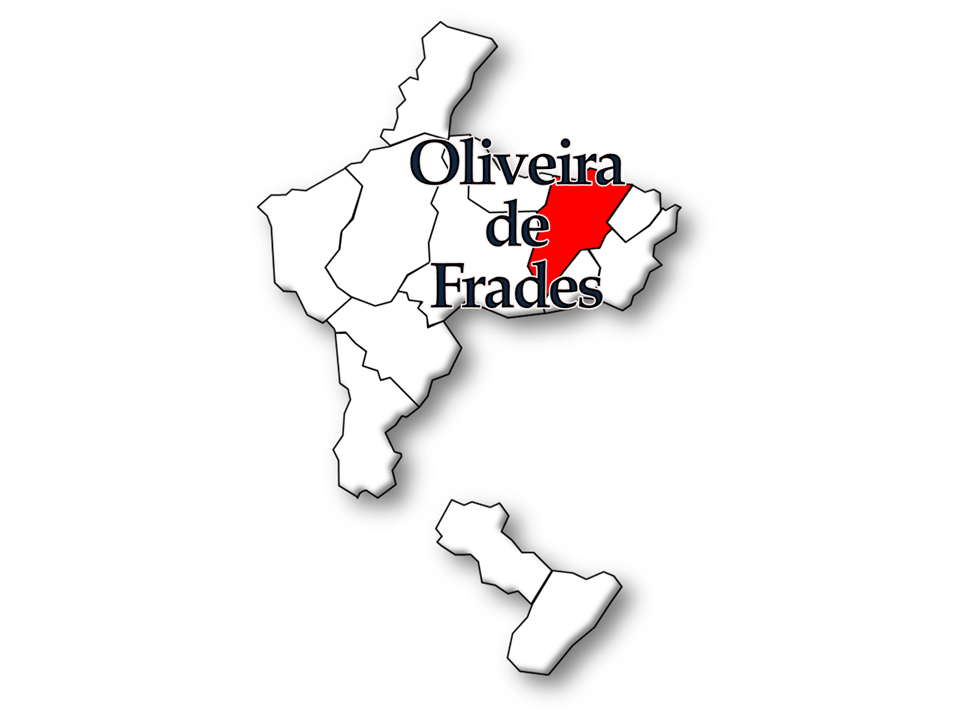 Mapa das freguesias